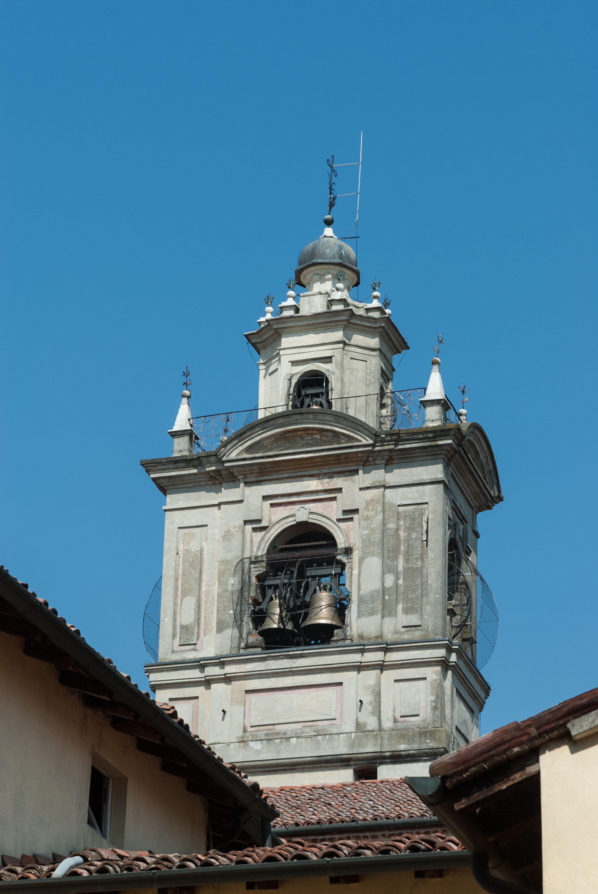 Torre della chiesa Santa Maria Assunta a Sabbioneta dalla Piazza San Rocco